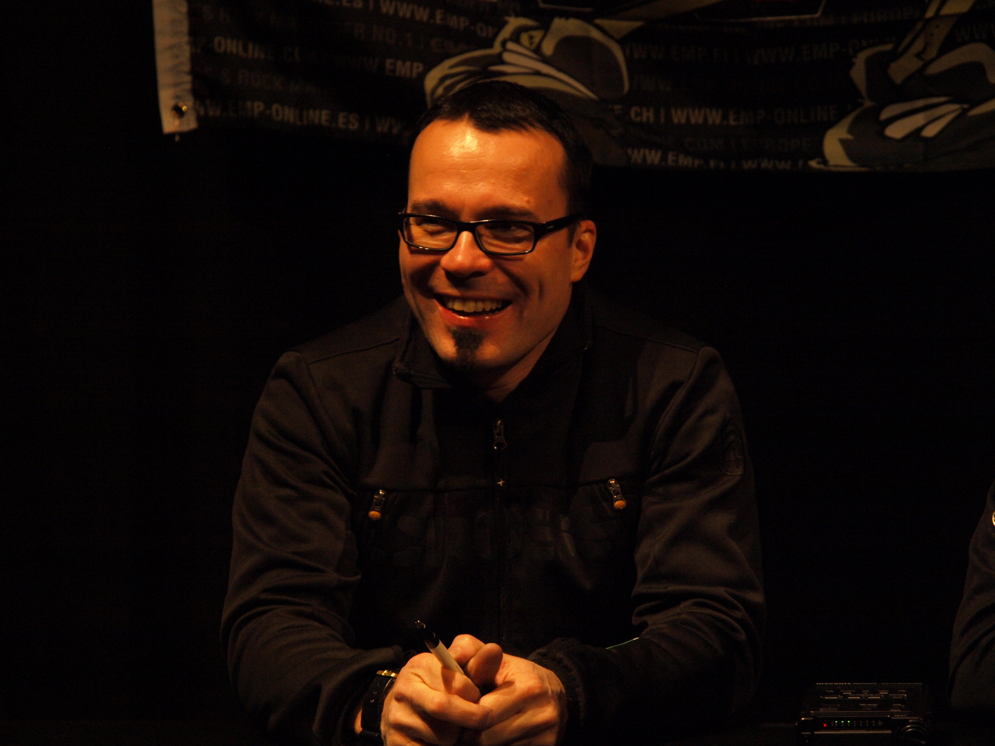 Paavo Lötjönen at Helsinki Metal Meeting 2010